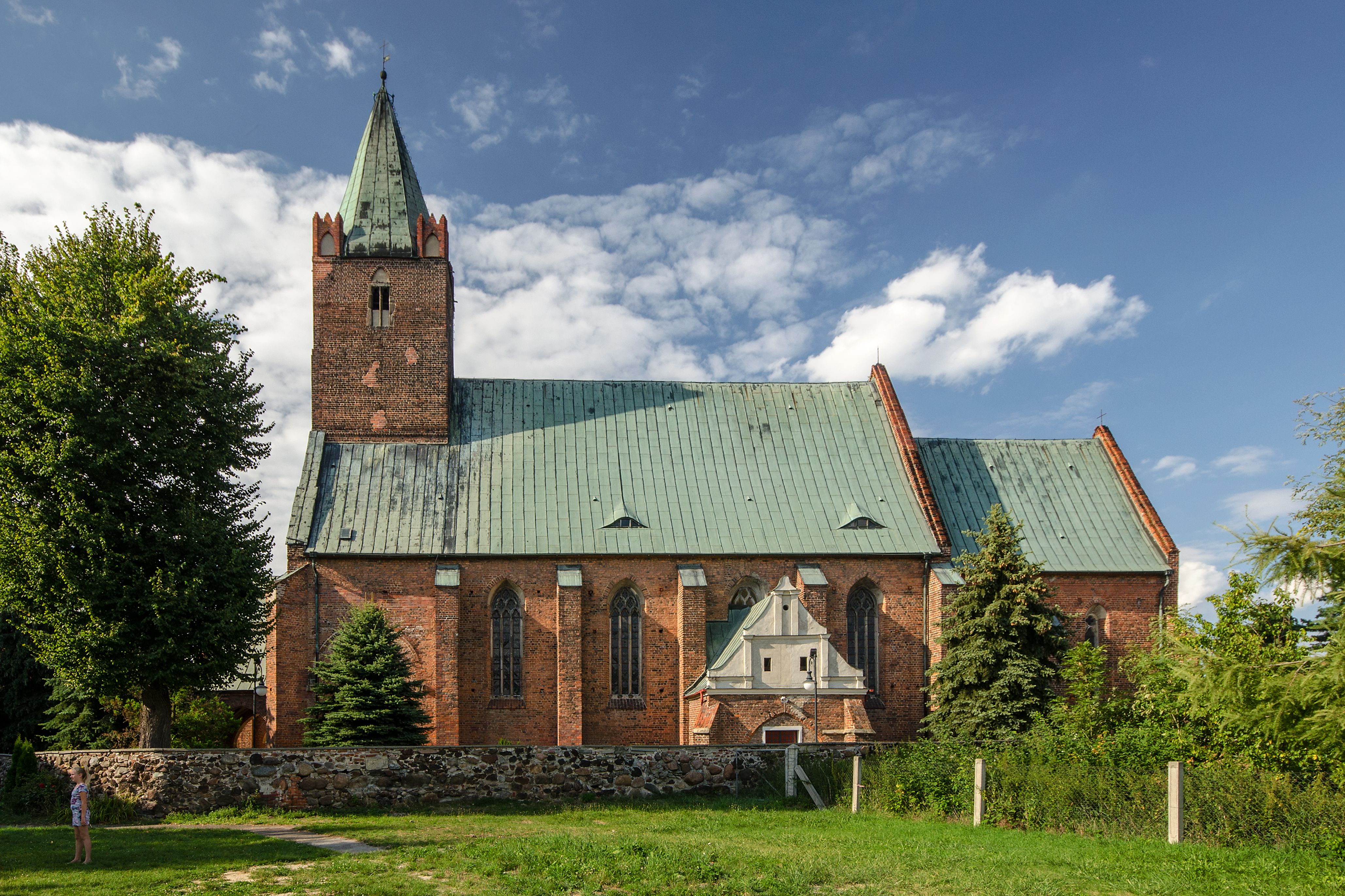 Małujowice, kościół par. p.w. św. Jakuba Apostoła, 1 poł. XIV, XV, 1691, XVII